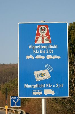 Österreichische Mautankündigung